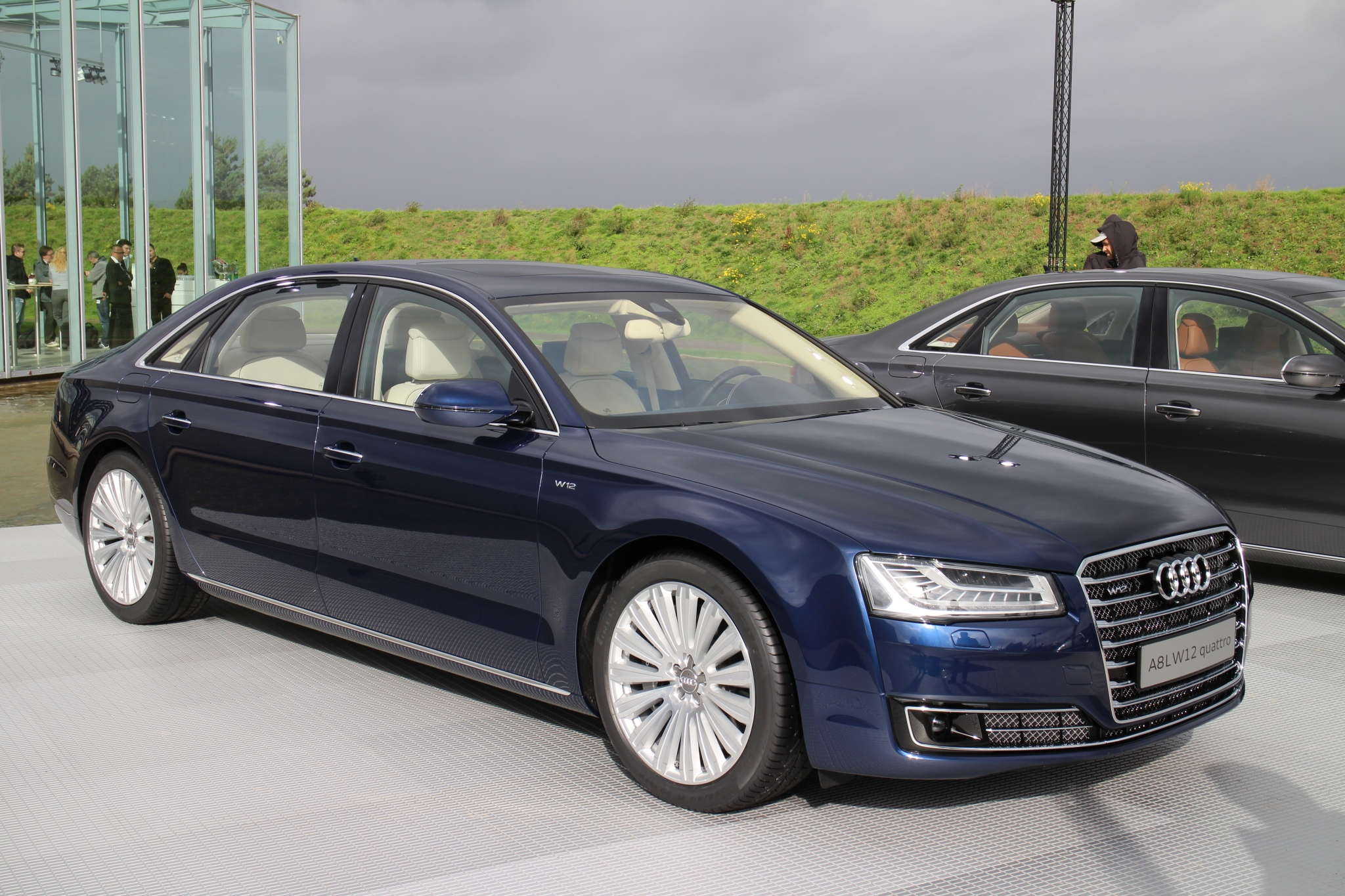 Facelift